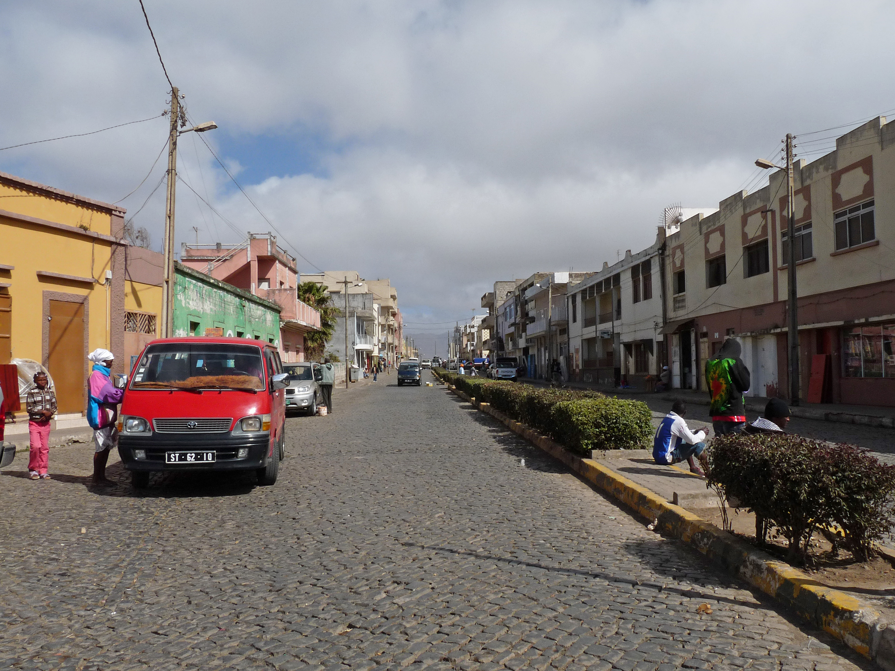 Une rue à Assomada (île de Santiago, Cap-Vert